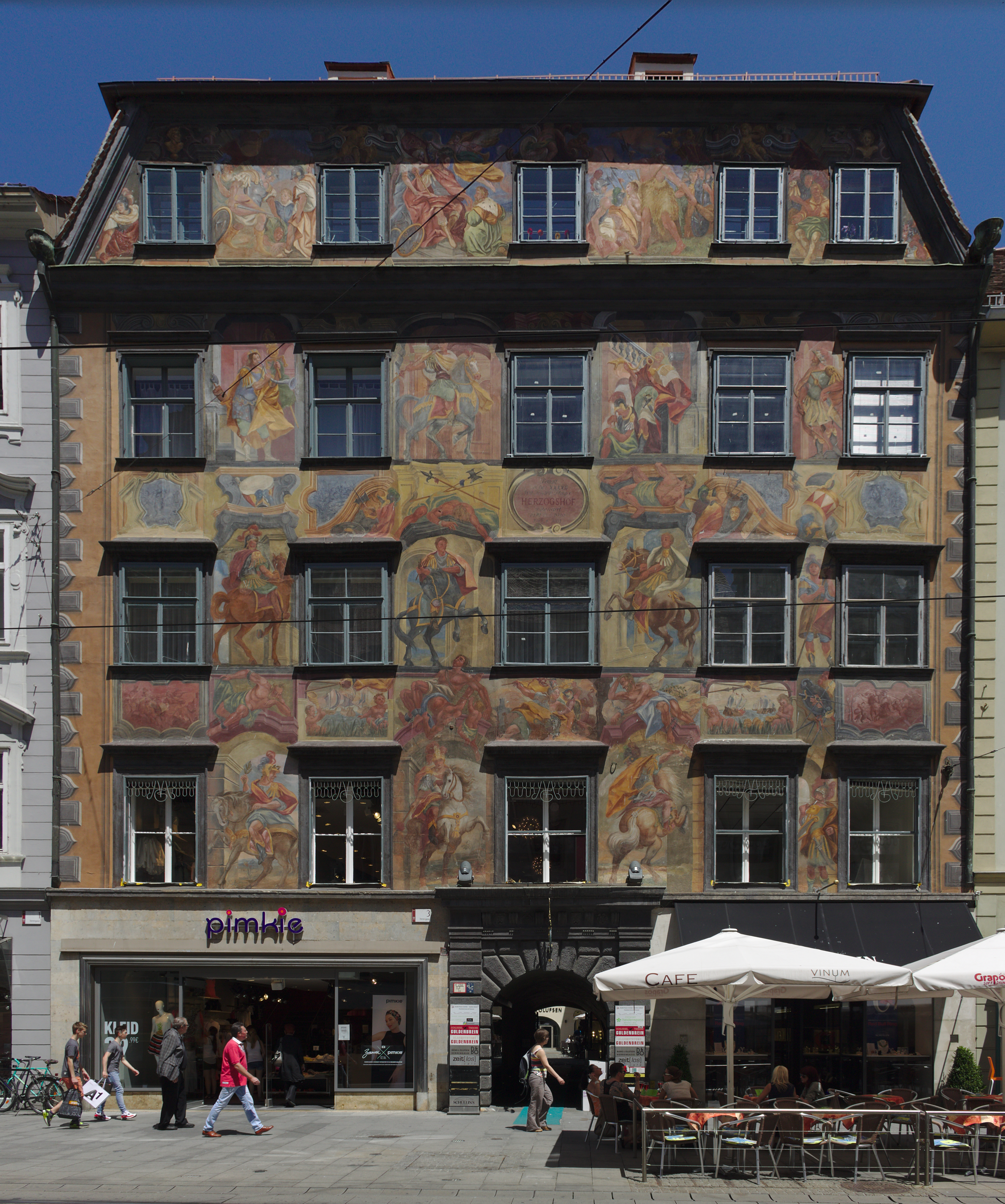 Ehem. Herzoghof, sogen. gemaltes Haus